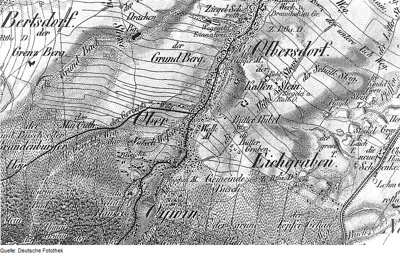 Original image description from the Deutsche Fotothek Olbersdorf. Oberreit, Sect. Zittau, 1844/46